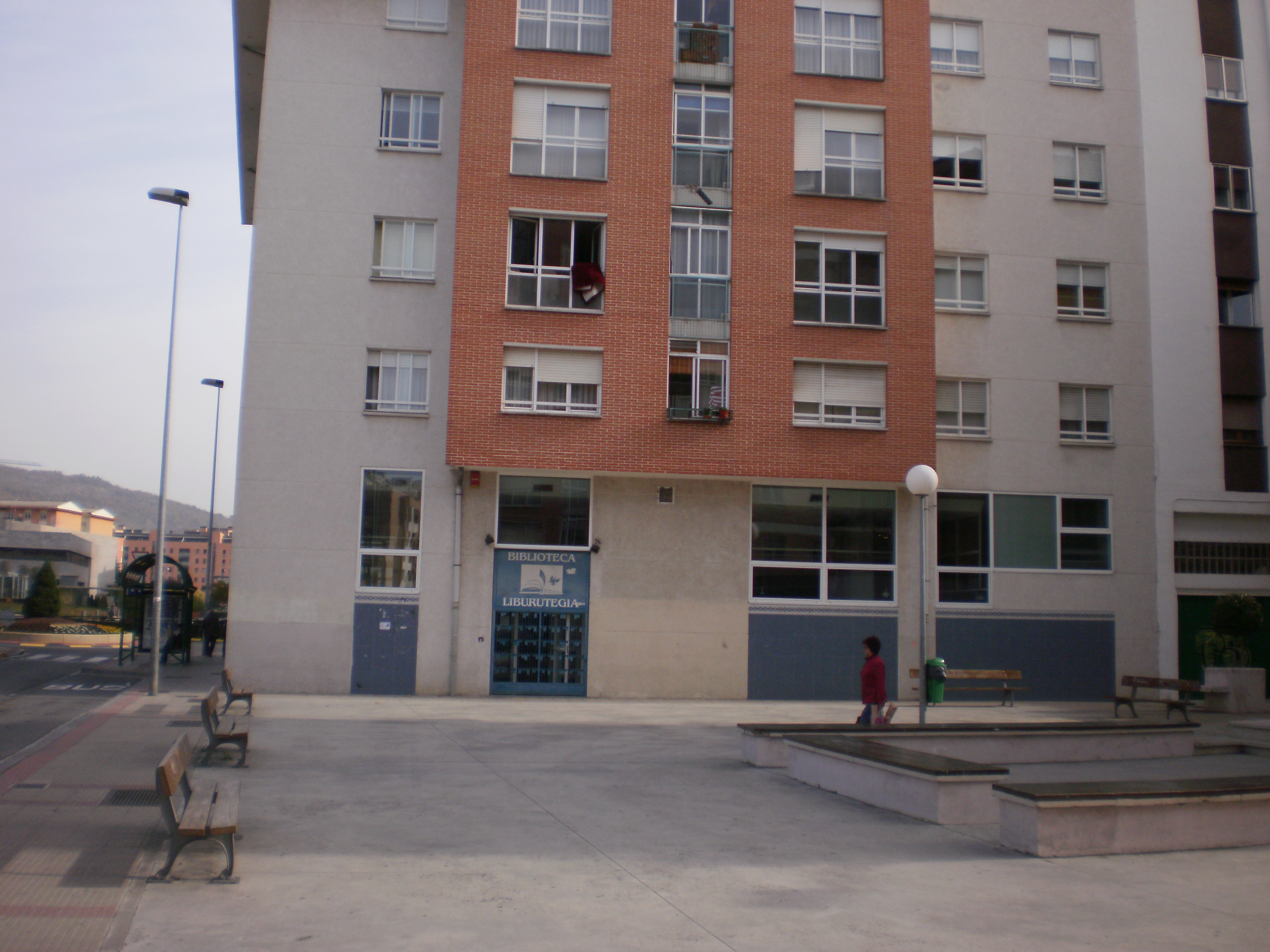 Biblioteca de Ansoáin (Navarra-España)